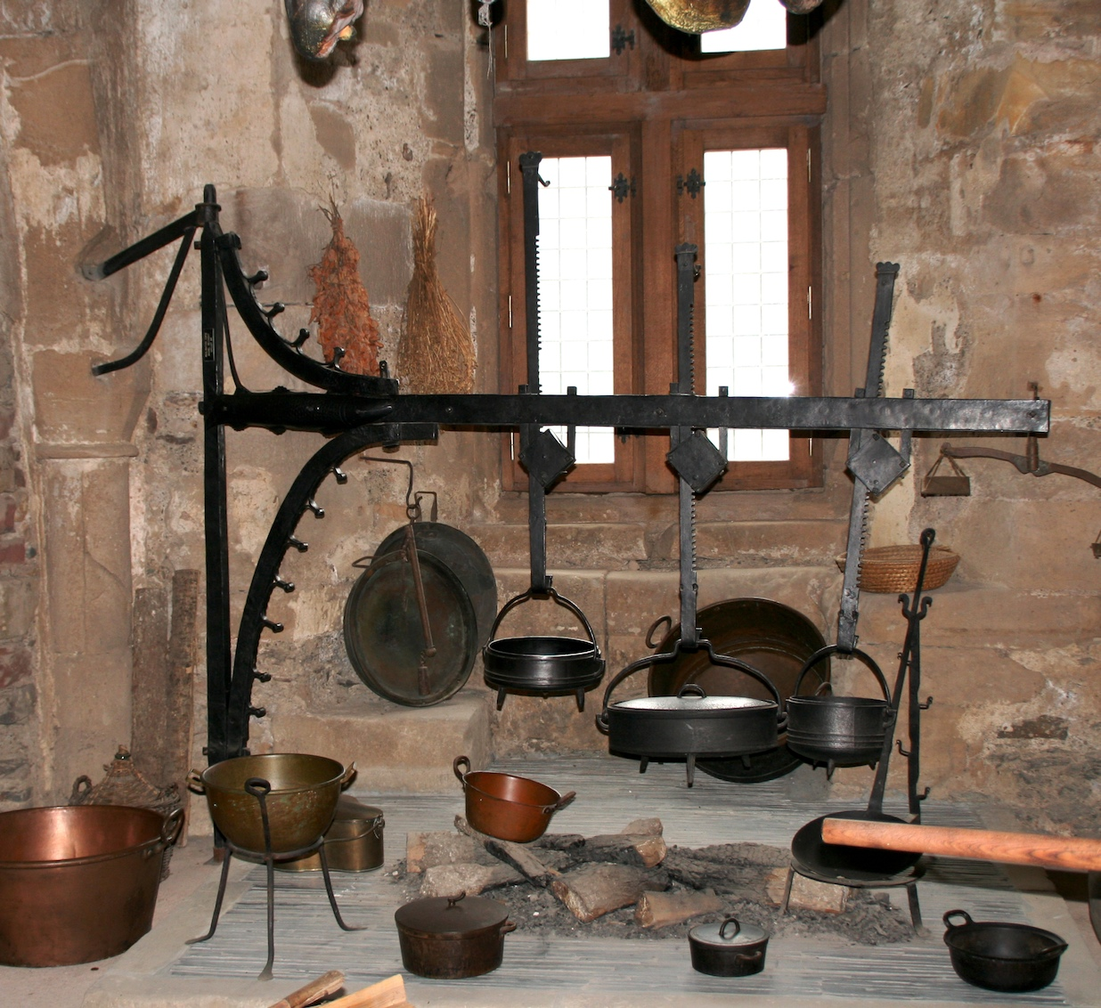 Dräifachen Héil an der Kiche vun der Veiner Buerg